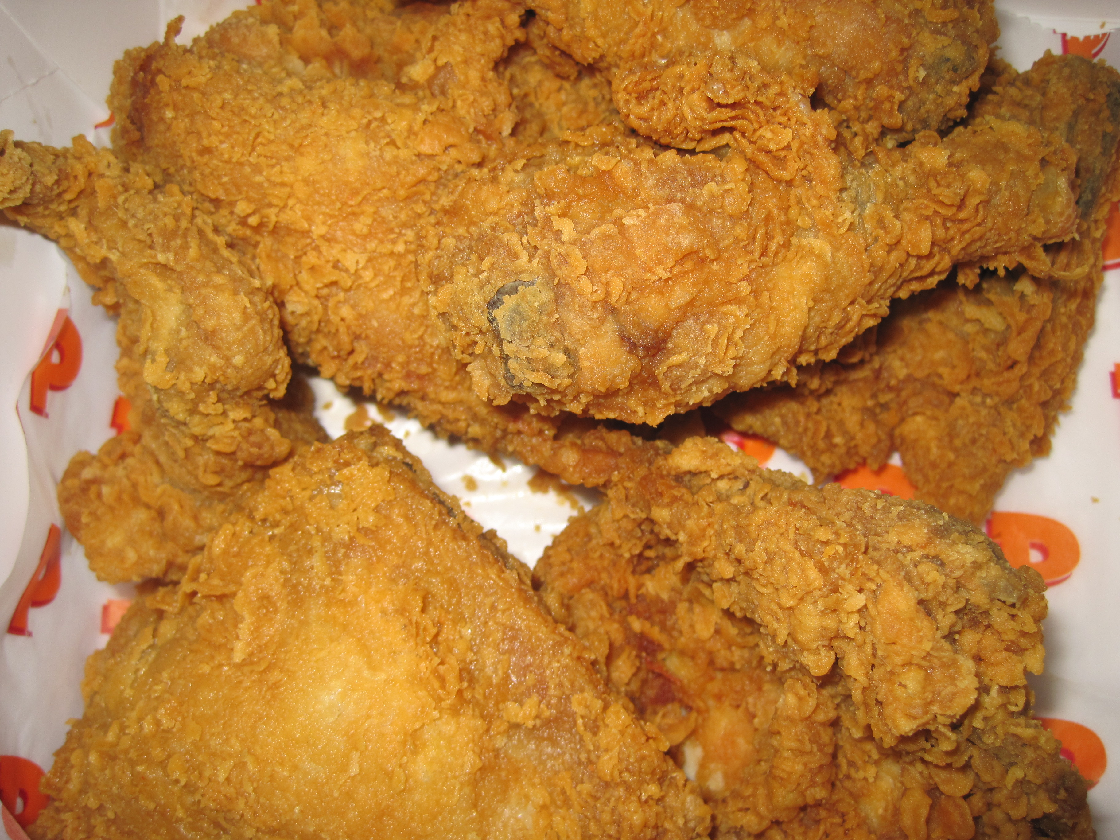 Popeyes Chicken & Biscuits biscuits